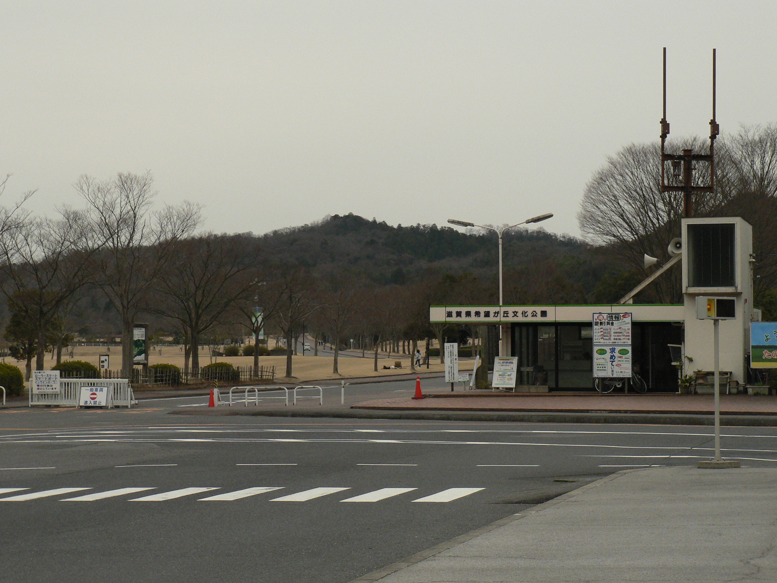 滋賀県希望が丘文化公園西ゲート。2013年3月撮影